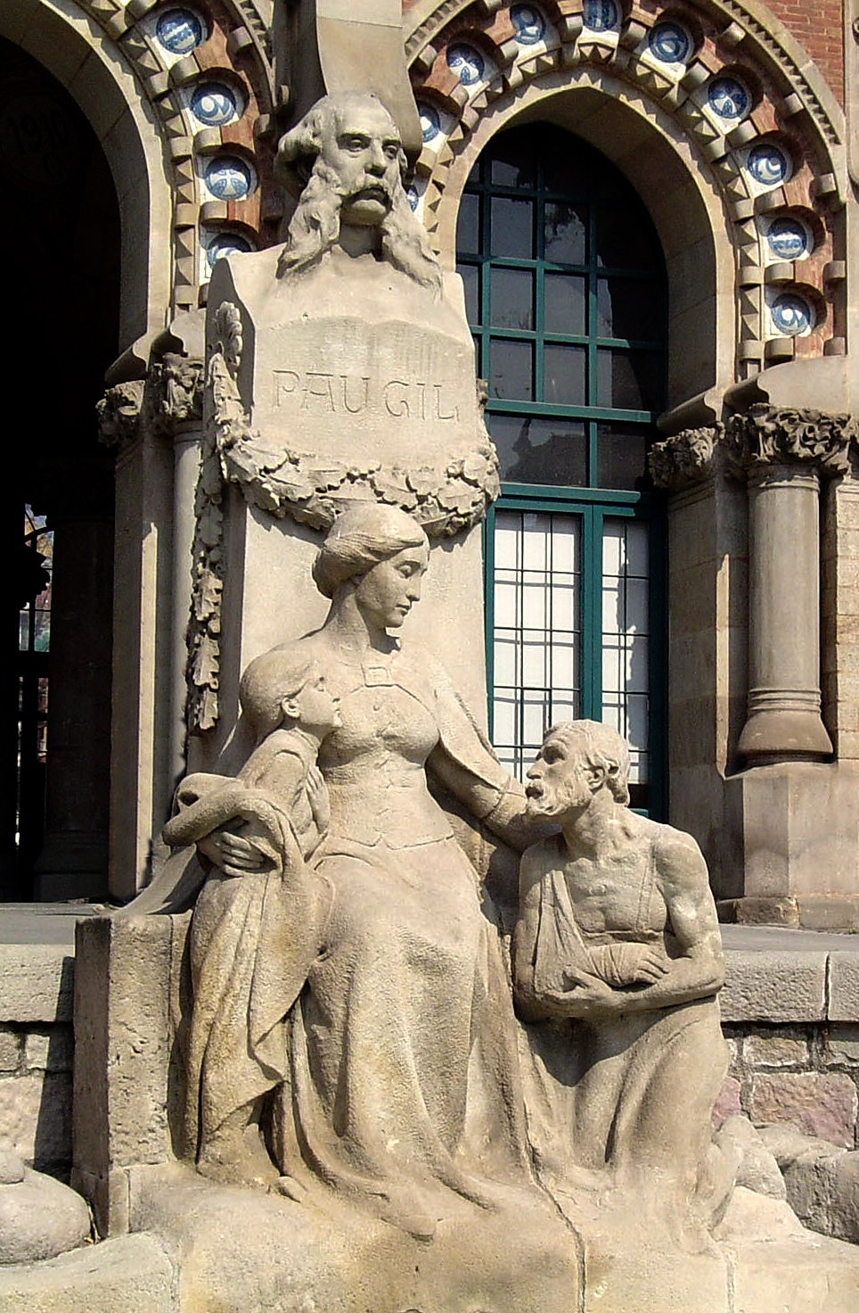 Monumento a Pau Gil en el Hospital de Sant Pau por Eusebi Arnau